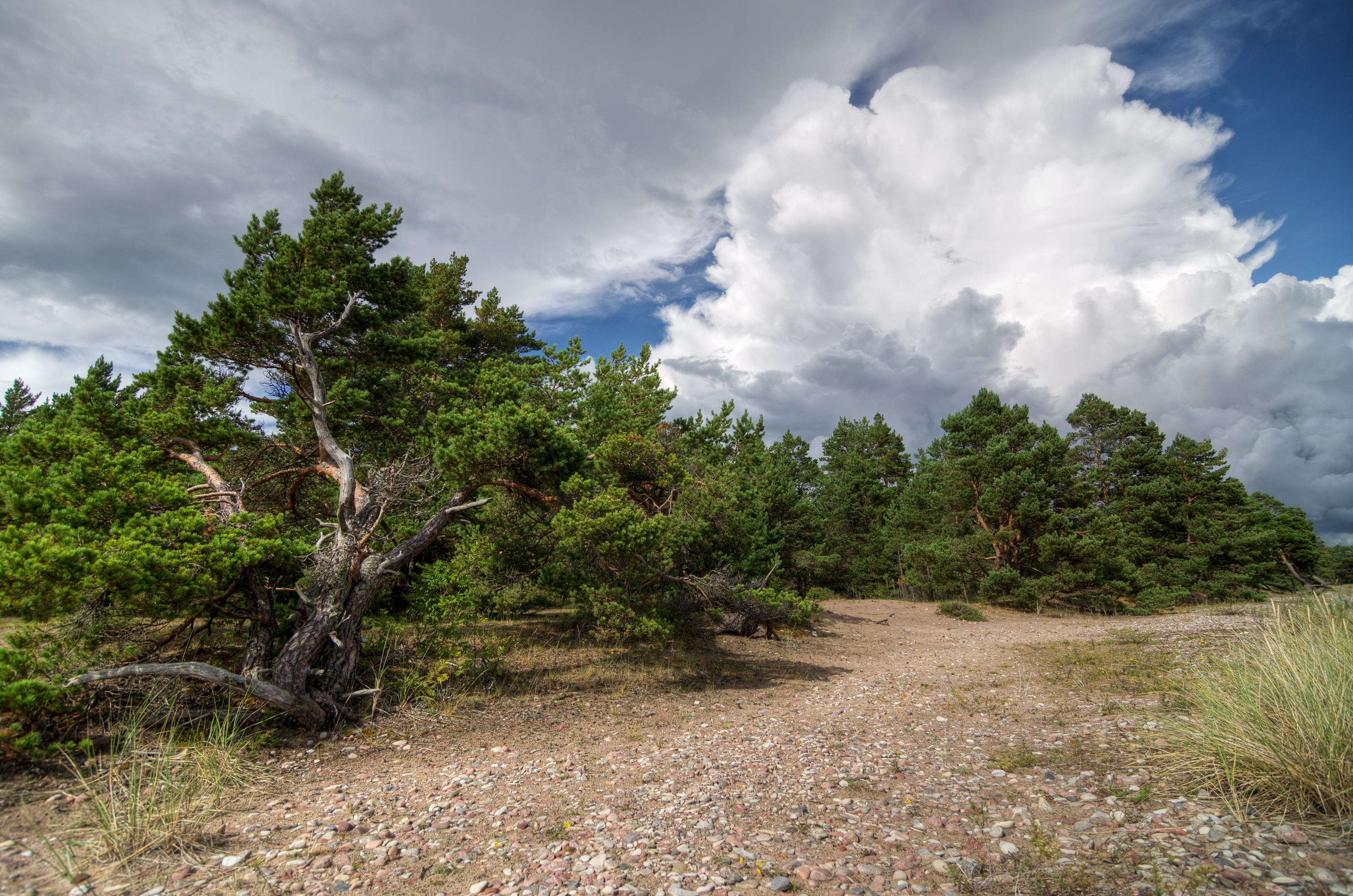 Rannamännid Järve luidete maastikukaitsealal